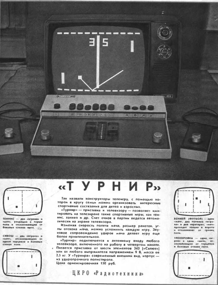 Отрывок из статьи «Домашние телеигры, «опубликованной в журнале «Радио» (№10/1977)